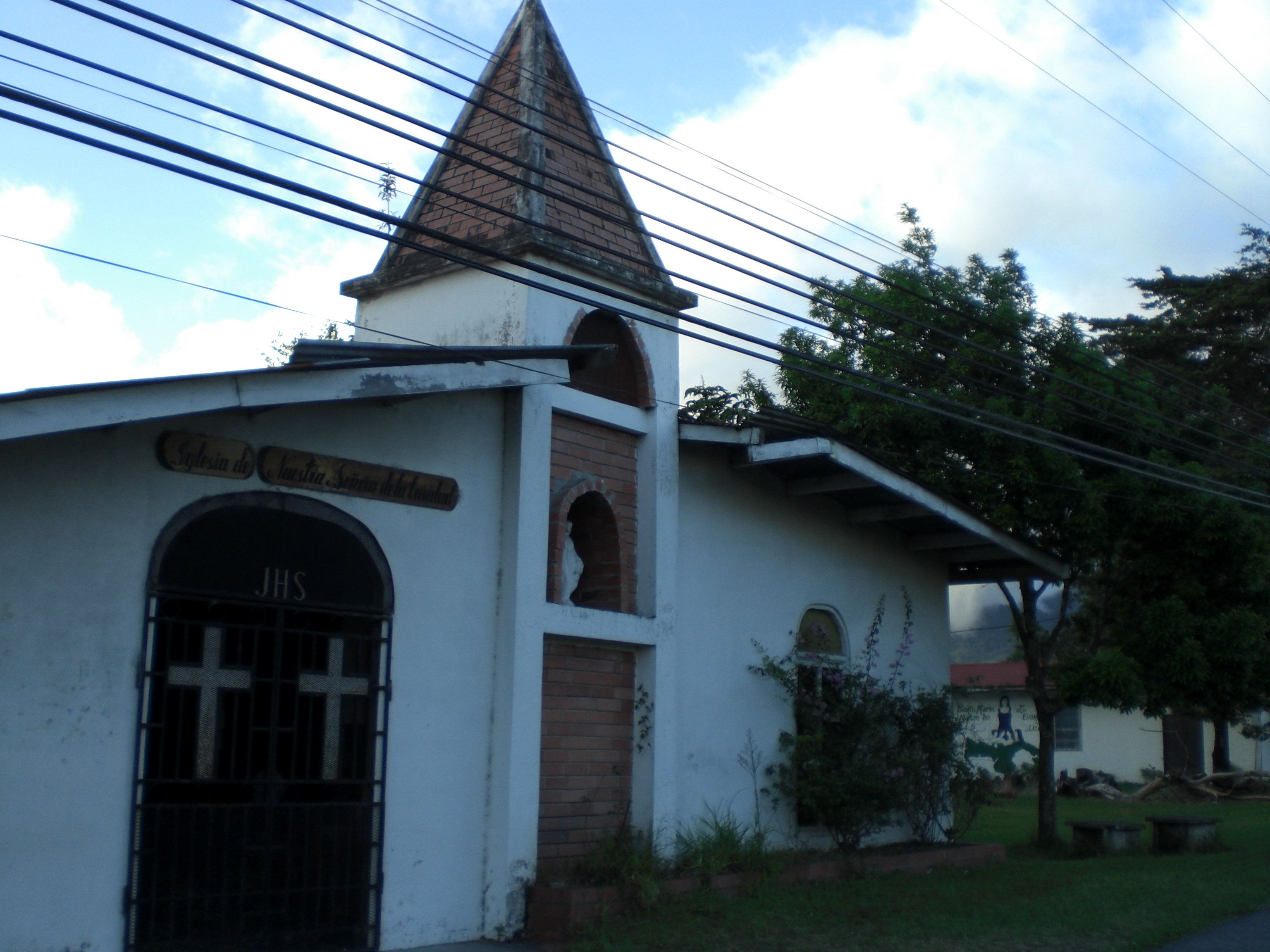 Iglesia de Nuestra Señora de la Caridad en Bugaba, Chiriquí, Panamá.